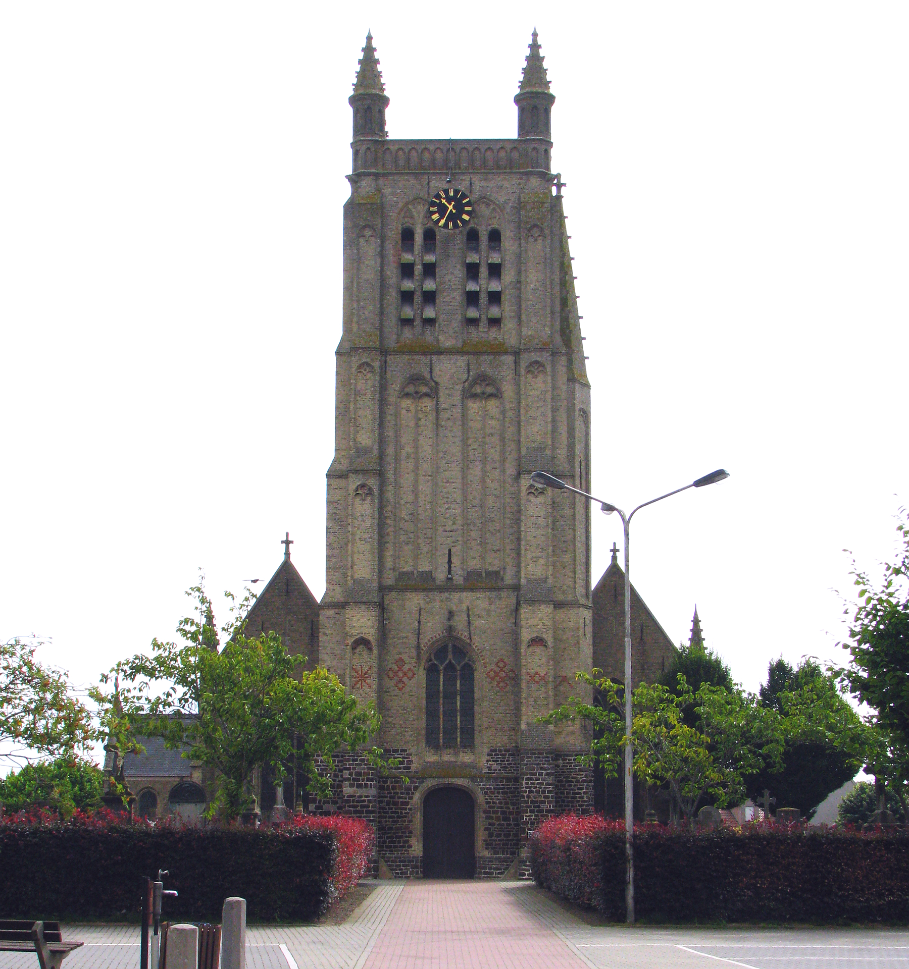 Gotische St.-Rictrudis-Kirche, Wiedererrichtung 1923, ehemals im 15. Jahrhundert erbaut. Der mächtige Turm sei stets ohne Turmspitze gewesen. Woesten Ortsteil der Gemeinde Vleteren, Westflandern Belgien - Foto Wolfgang Pehlemann IMG_1387